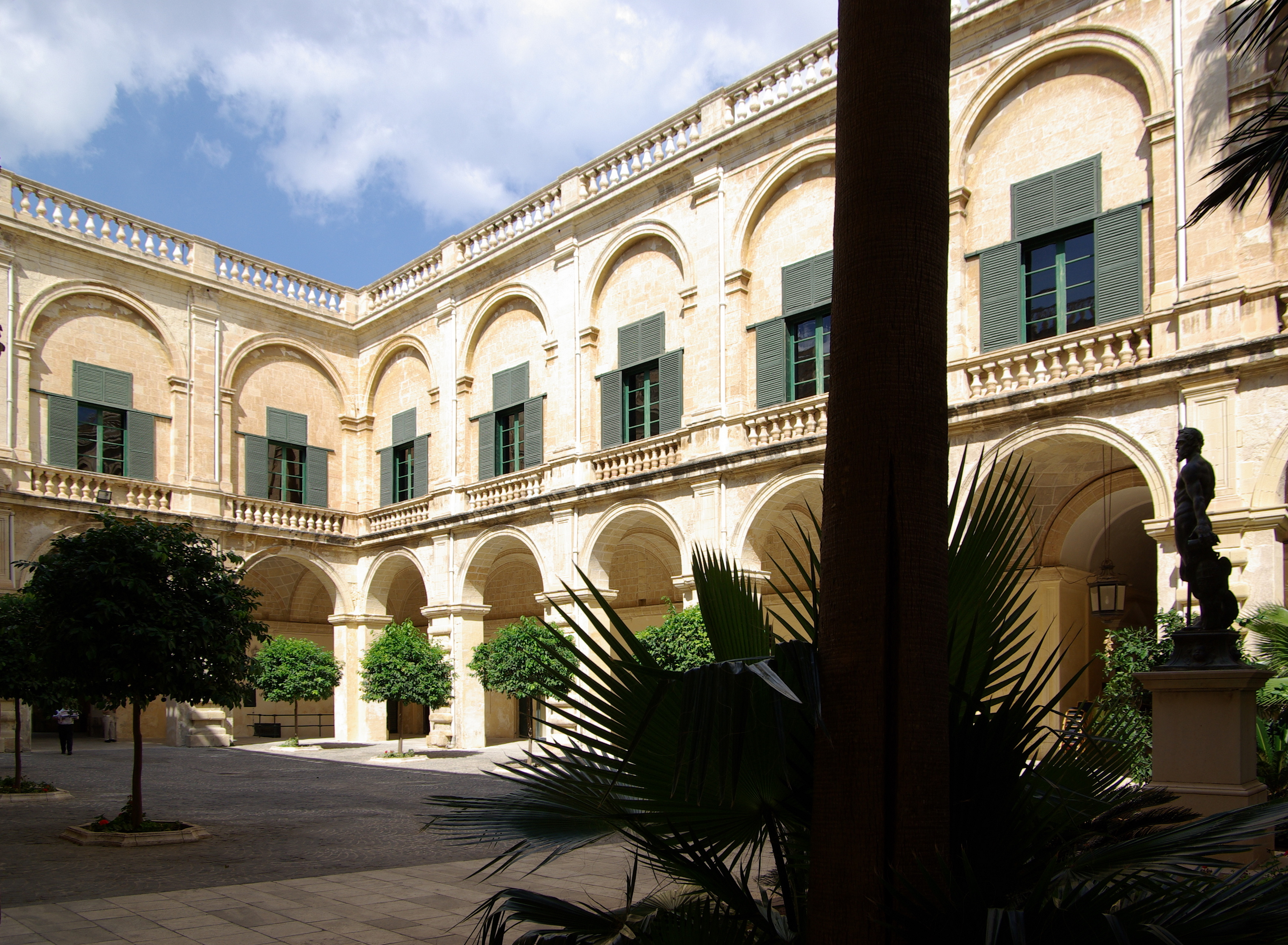 Malta, Valletta, Großmeisterpalast, Neptunhof